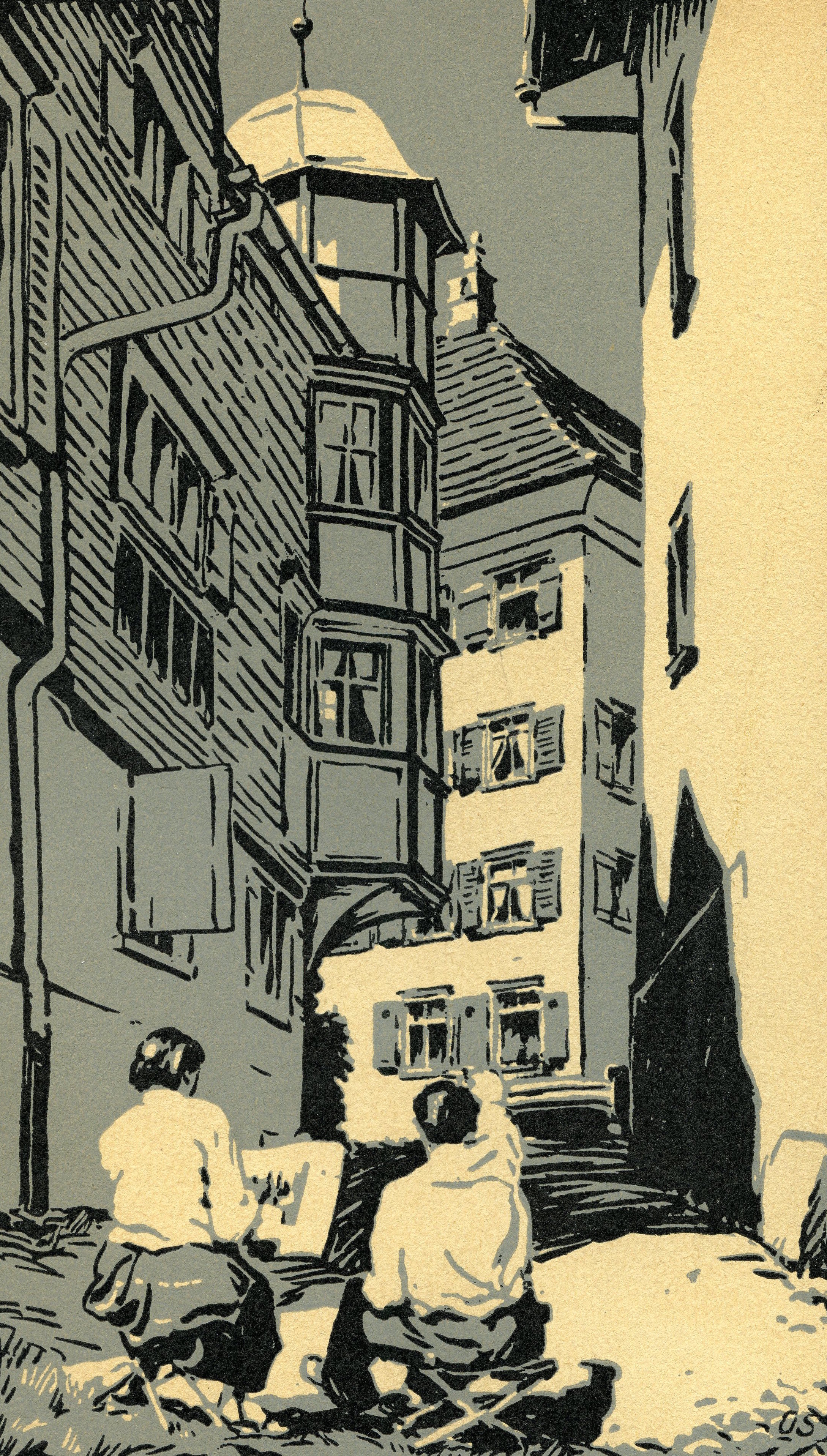 Cover der KVT-Mitteilungen Nr. 32 (Ausschnitt). Erkergässli in Trogen